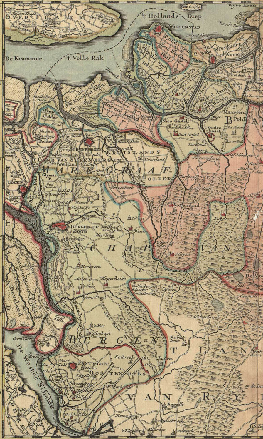 Kaart van het Markiezaat van Bergen op Zoom (1747)